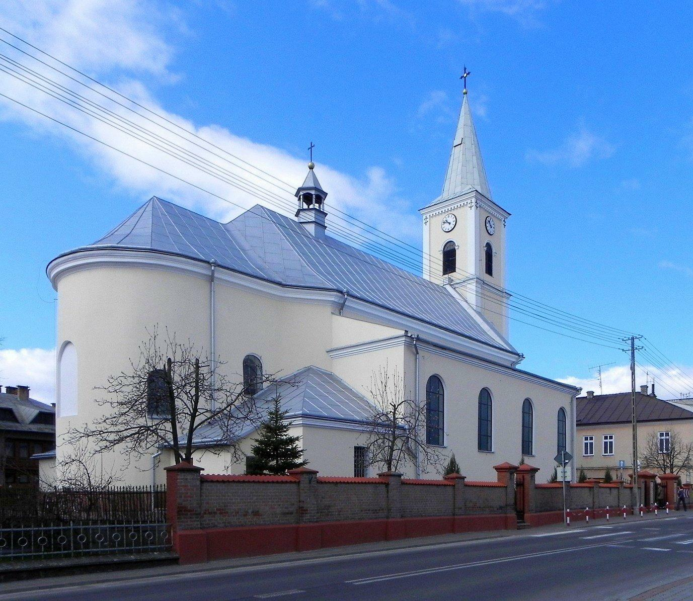 Kościół pw. Św. Wojciecha w Cieszanowie.